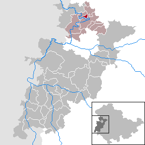 Ebenshausen in Thuringia - Wartburgkreis